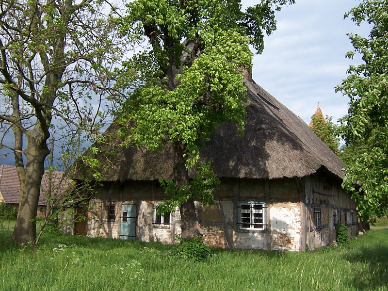 Wohnteil eines unsanierten Bauernhauses in Wiendorf